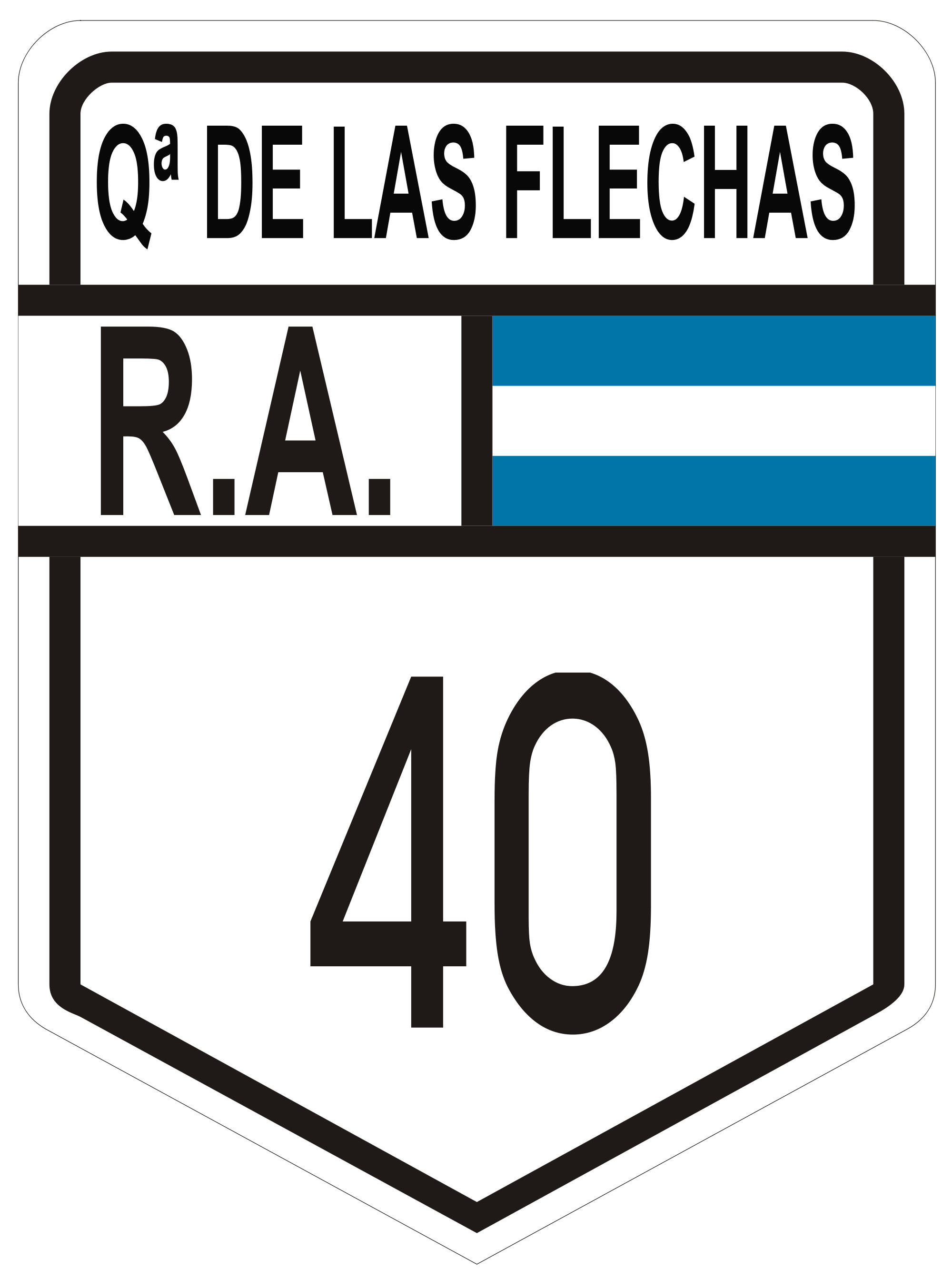 Quebrada de las flechas - RN40